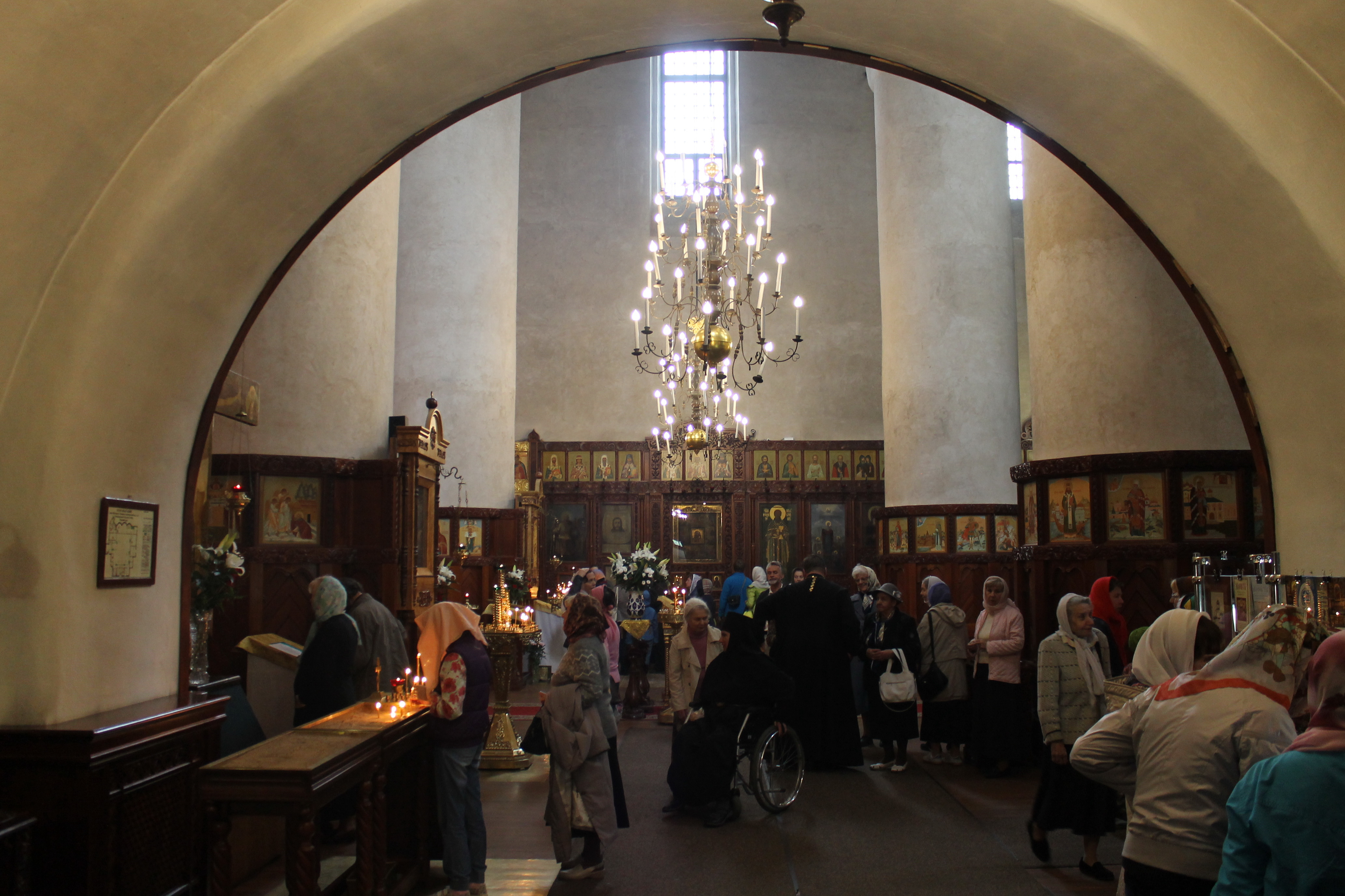 Собор Федоровский (Санкт-Петербург и Лен.область, Пушкин, Академический проспект, 32, северо-восточная часть парка)